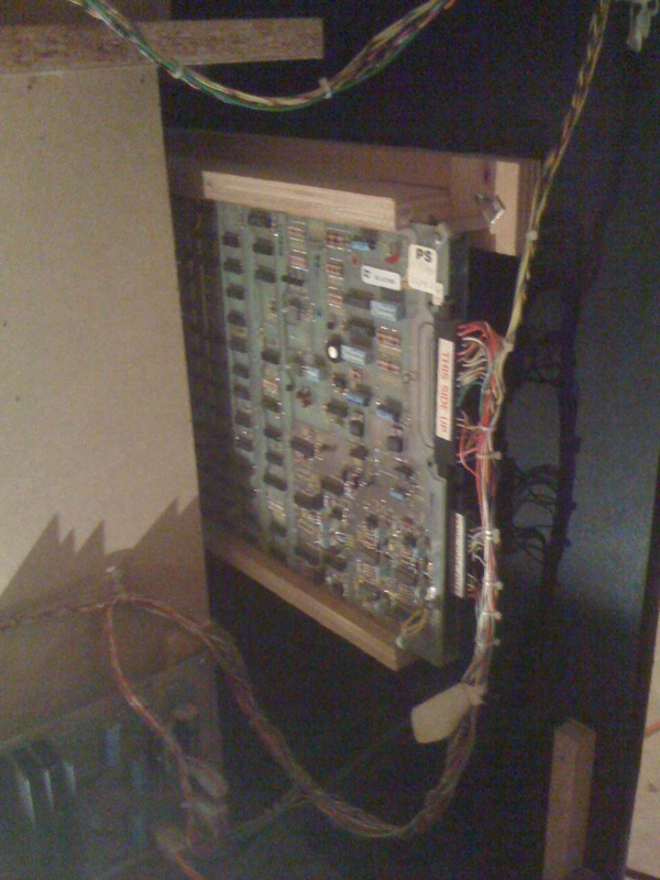 Tempest Main Arcade PCBTempest Main PCB